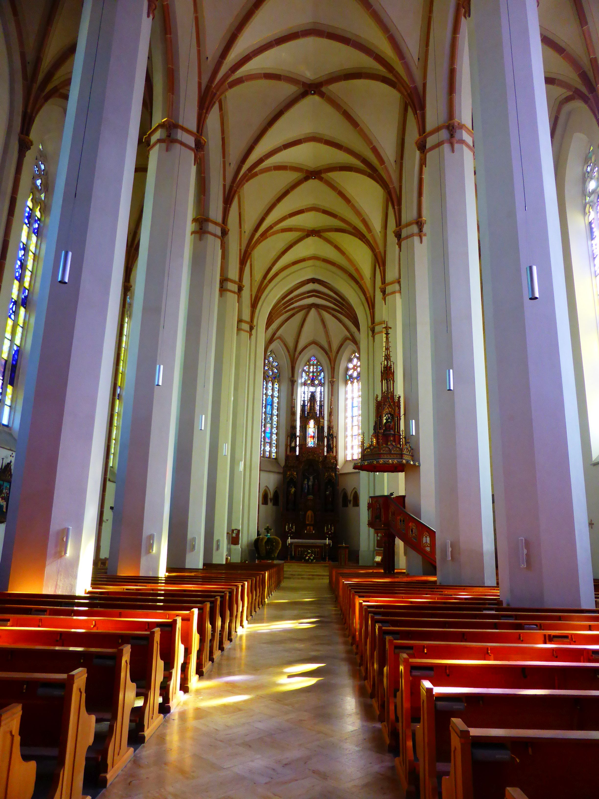 Kath. Pfarrkirche hll. Johannes d. T. und Evangelist